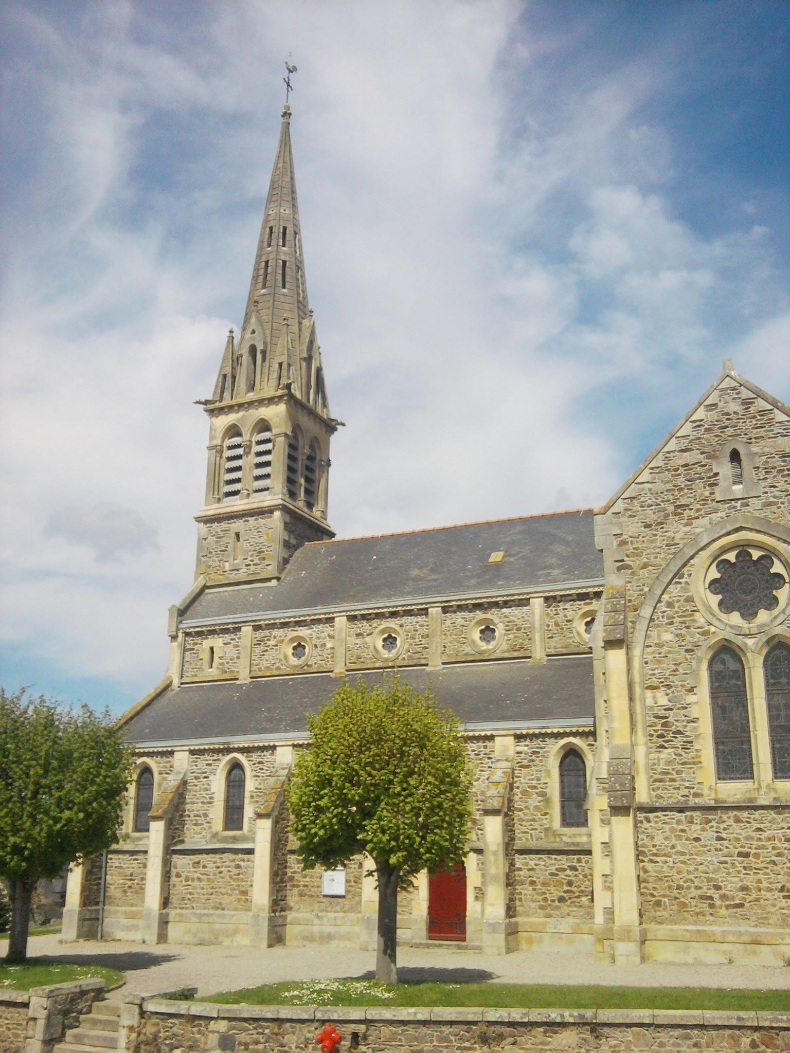 Église Saint-Sébastien de Noyal (Côtes-d'Armor), France